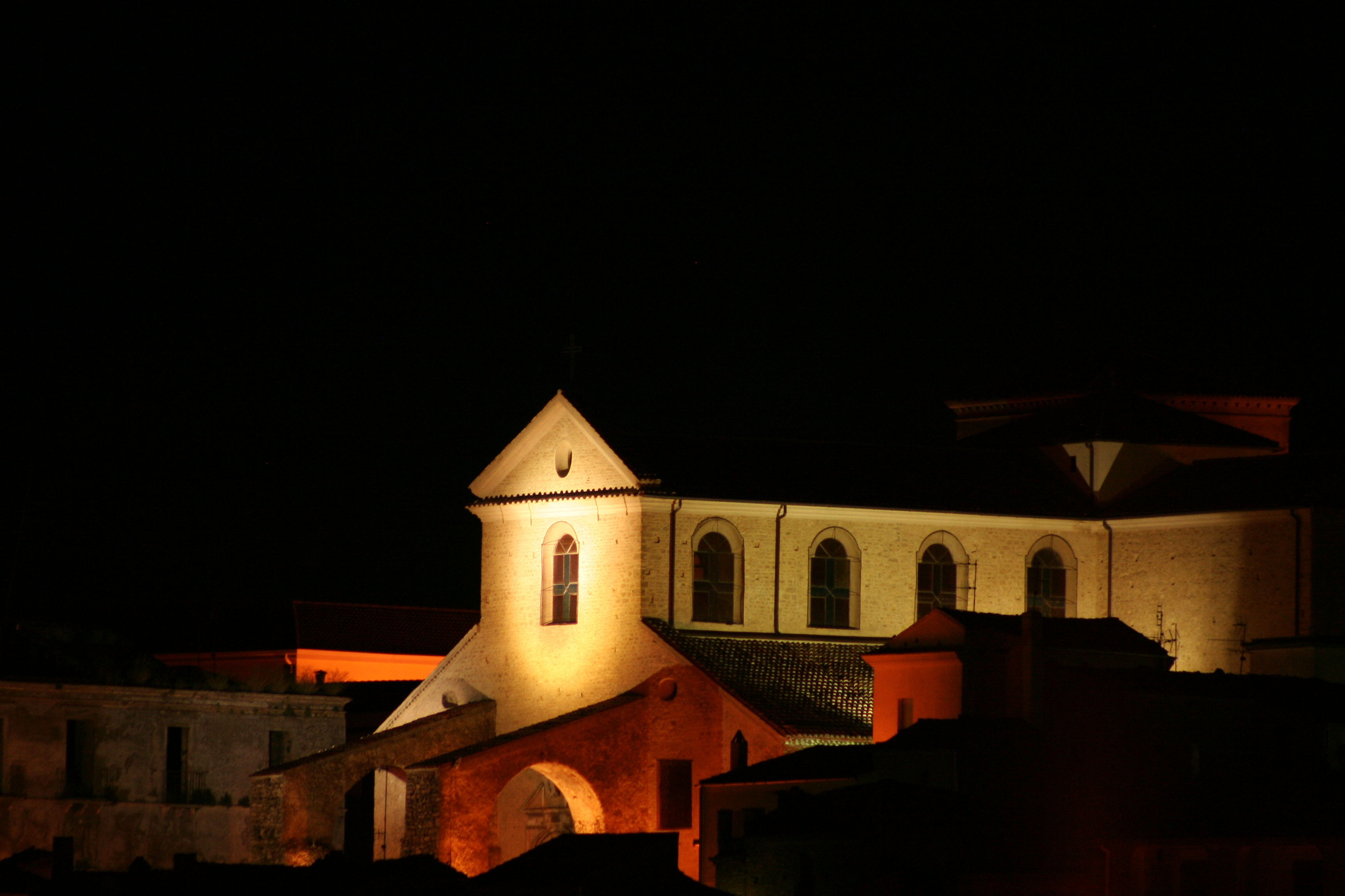 Autore: Rocco Stasi fonte: fatta da me, sono l'autore licenza: GFDL, sono l'autore Suggestiva immagine della cattedrale ripresa dal rione S. Maria, nei pressi della Casa Comunale.